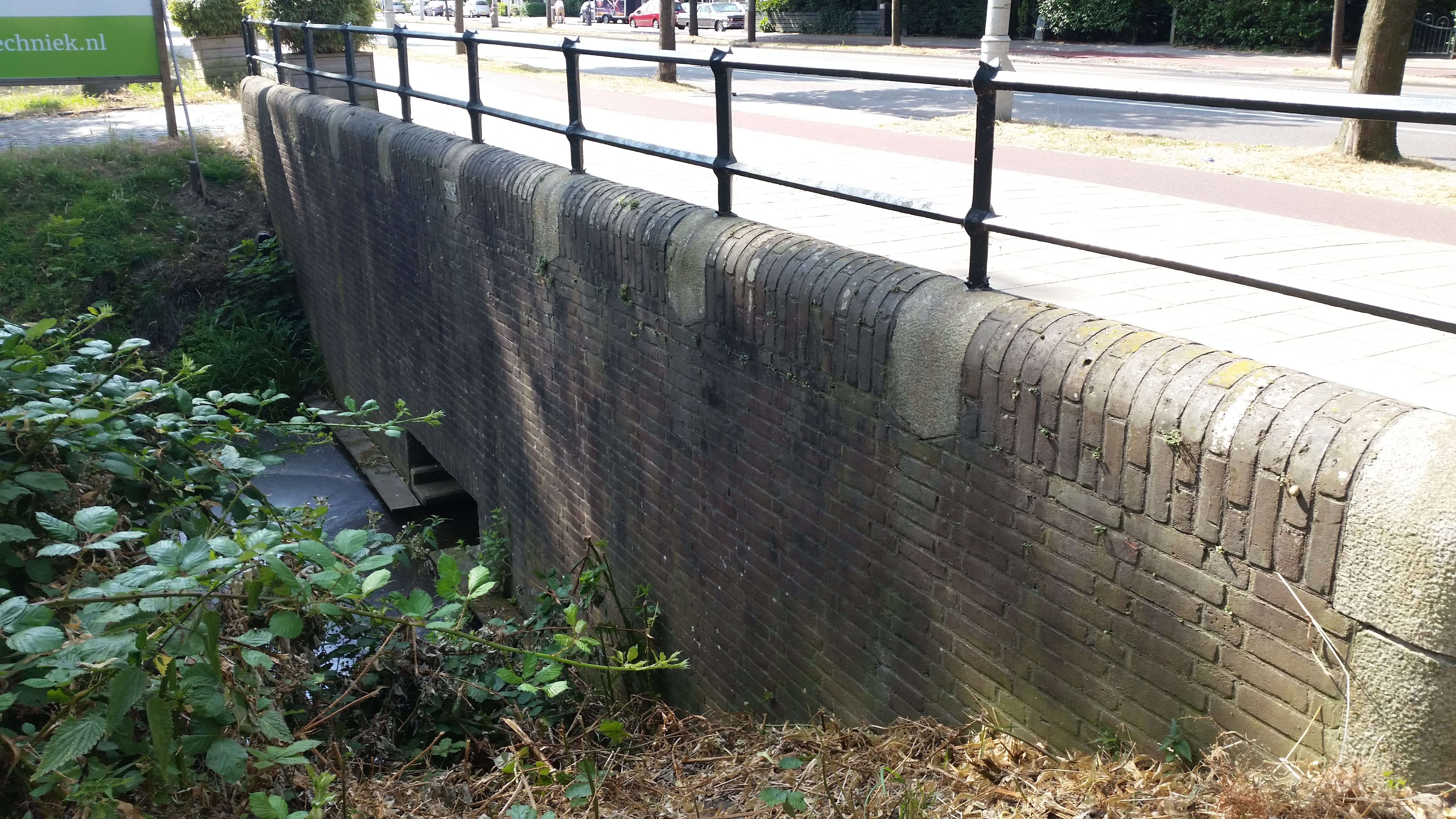 Brug 245, Rinus Michelsbrug, leuning en balustrade